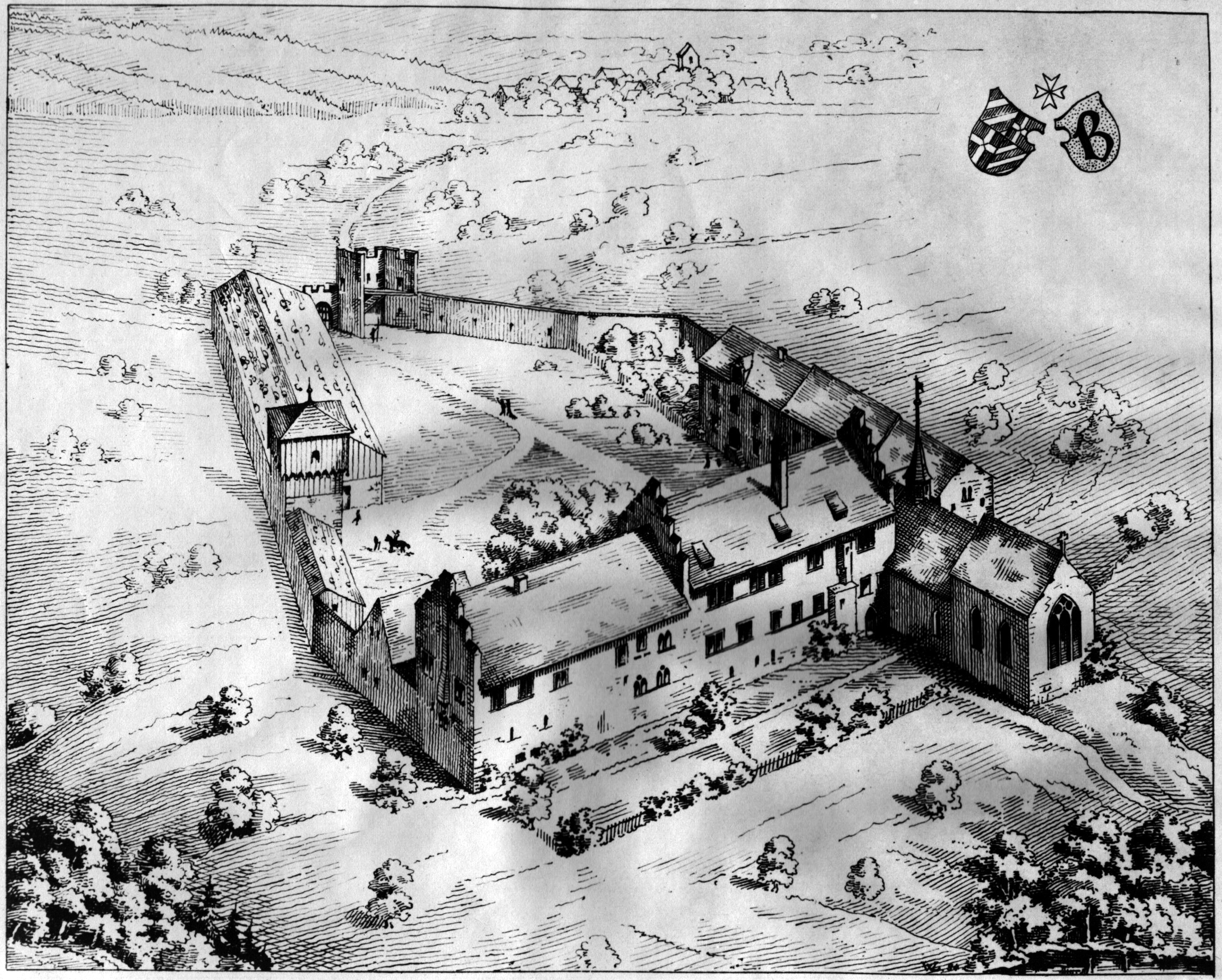 Die Kommende Bubikon im 16. Jahrhundert. Rekonstruktion von Architekt W. Lehmann nach Zeller-Werdmüller.